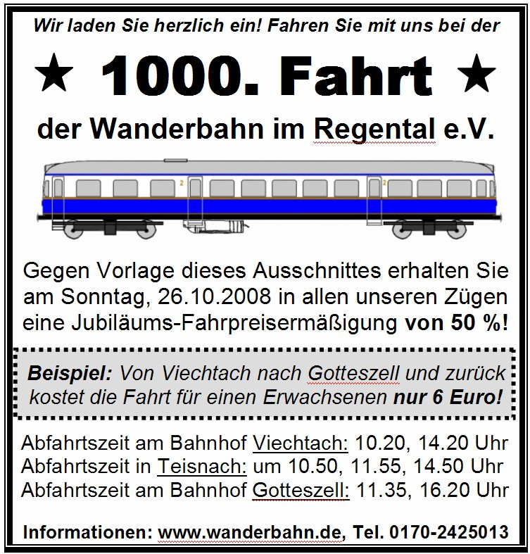 Anzeige Sonderfahrt der Wanderbahn im Regental am 26.10.2008